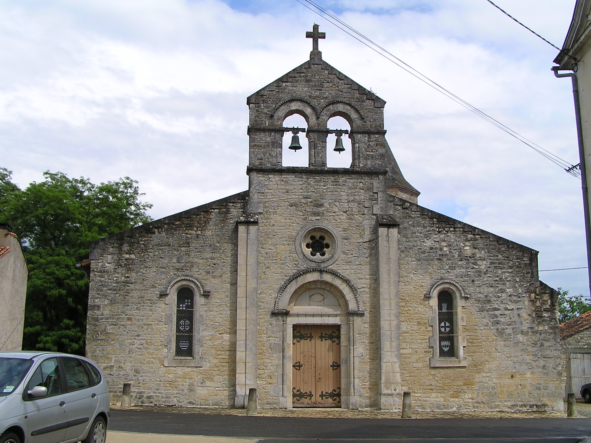 église de Fouqueure, Charente, France